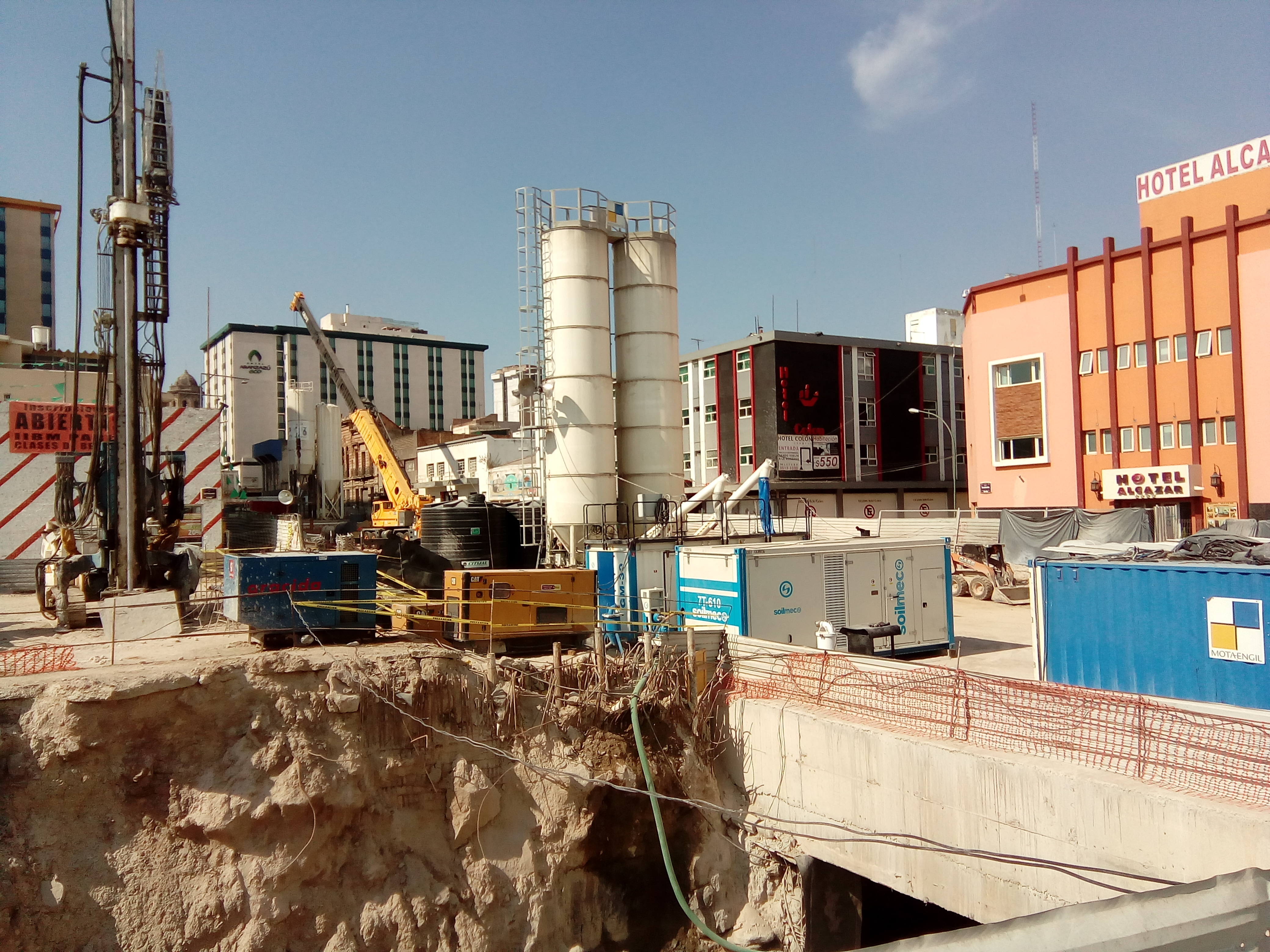 Avance de obras a nivel de calle sobre la estación Independencia de la L3 del Tren Ligero